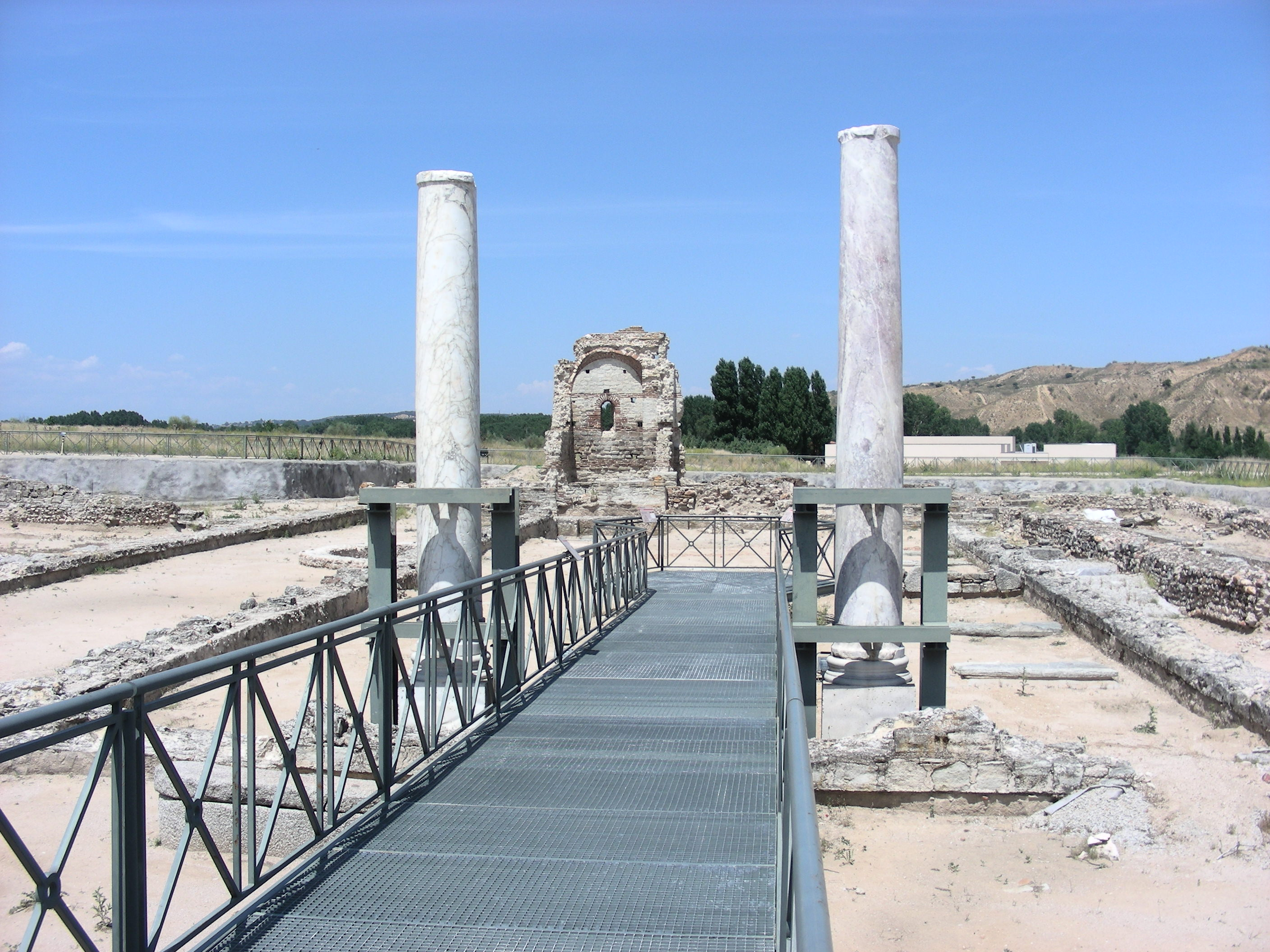 Blick auf das Palatium im archäologischen Park bei Carranque in Spanien mit den imposanten Marmorsäulen im Vordergrund